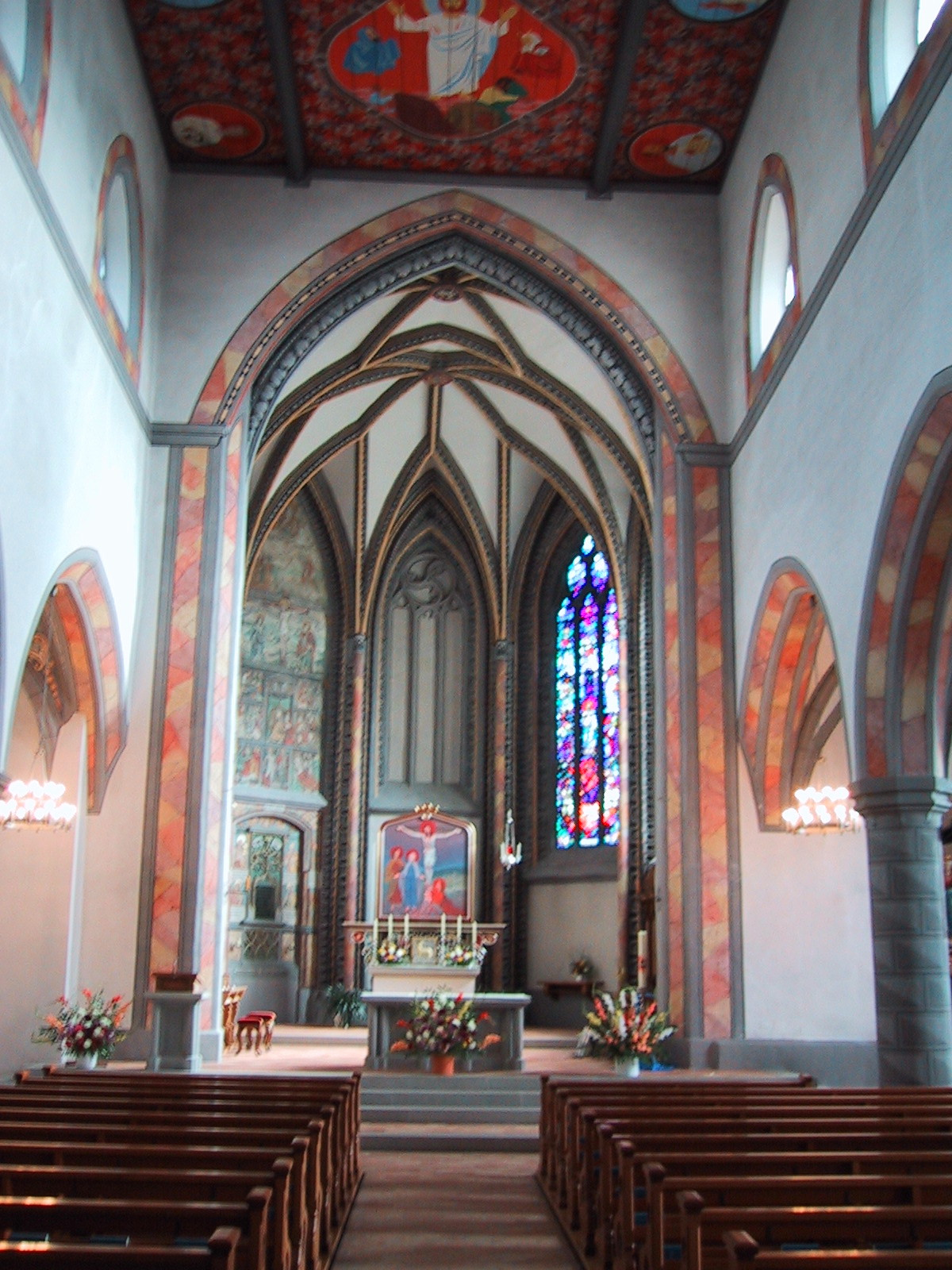 Innenansicht der Stadtkirche in Wil, Kanton St. Gallen